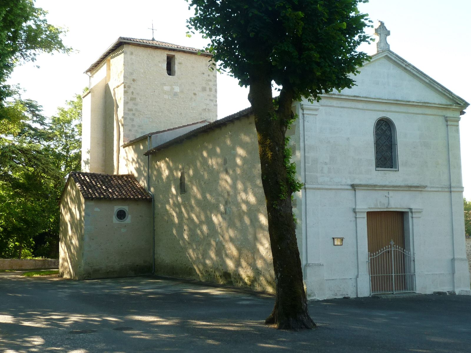 église d'Aignes (16), France